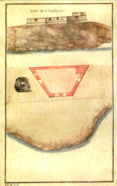 "Forte de S. Matheos", s/d, autor desconhecido, Arquivo Histórico Militar, Lisboa. in MARTINS, José Salgado, "Património Edificado da Ilha Terceira: o Passado e o Presente". Separata da "Atlântida", vol. LII, 2007. p. 19. Também integrante da prancha "Forte de S. Matheos; Forte do Negrito" (Fortes de São Mateus, ilha Terceira), Desenho aguarelado, 54 x 42 cm. in Colecção de Plantas e Alçados de 32 Fortalezas dos Açores, por Joze Rodrigo d'Almeida em 1830, José Rodrigo de Almeida, 1830 (c.) GEAEM (346-1-8A-96), Lisboa, Portugal.